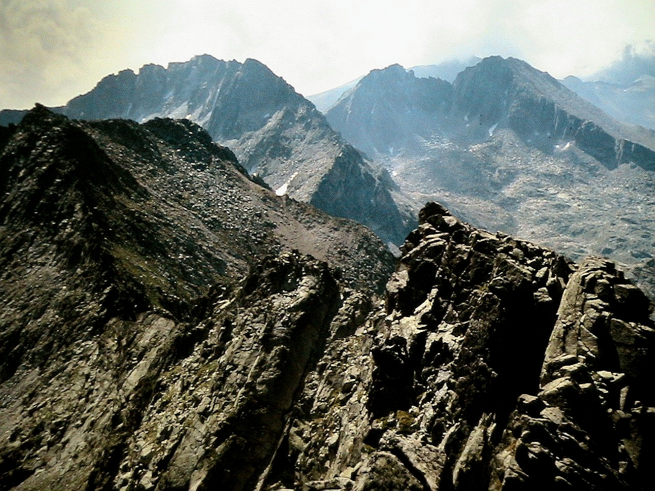 El Tuc de Saburó en primer terme, i a continuació la Mainera i la Pala Pedregosa, des del Peguera. La Torre de Cabdella (Pallars Jussà - Catalunya). Foto presa de la projecció d'una diapositiva.